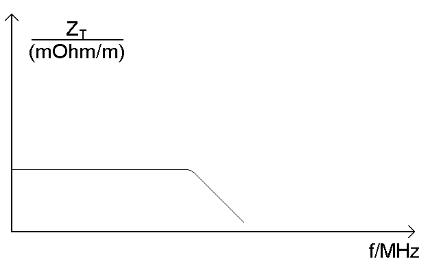 Transferimpedanz, Semirigid